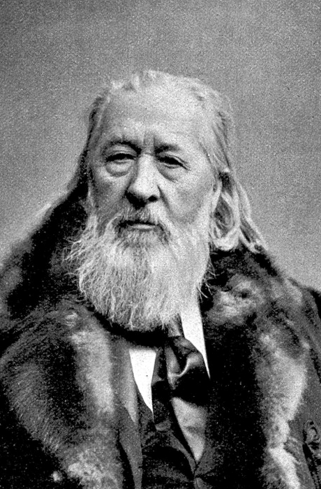 Johann Jakob Im Hof (1815–1900) Politiker, Kunstmäzen. Fotografie von J. Ruf, Basel